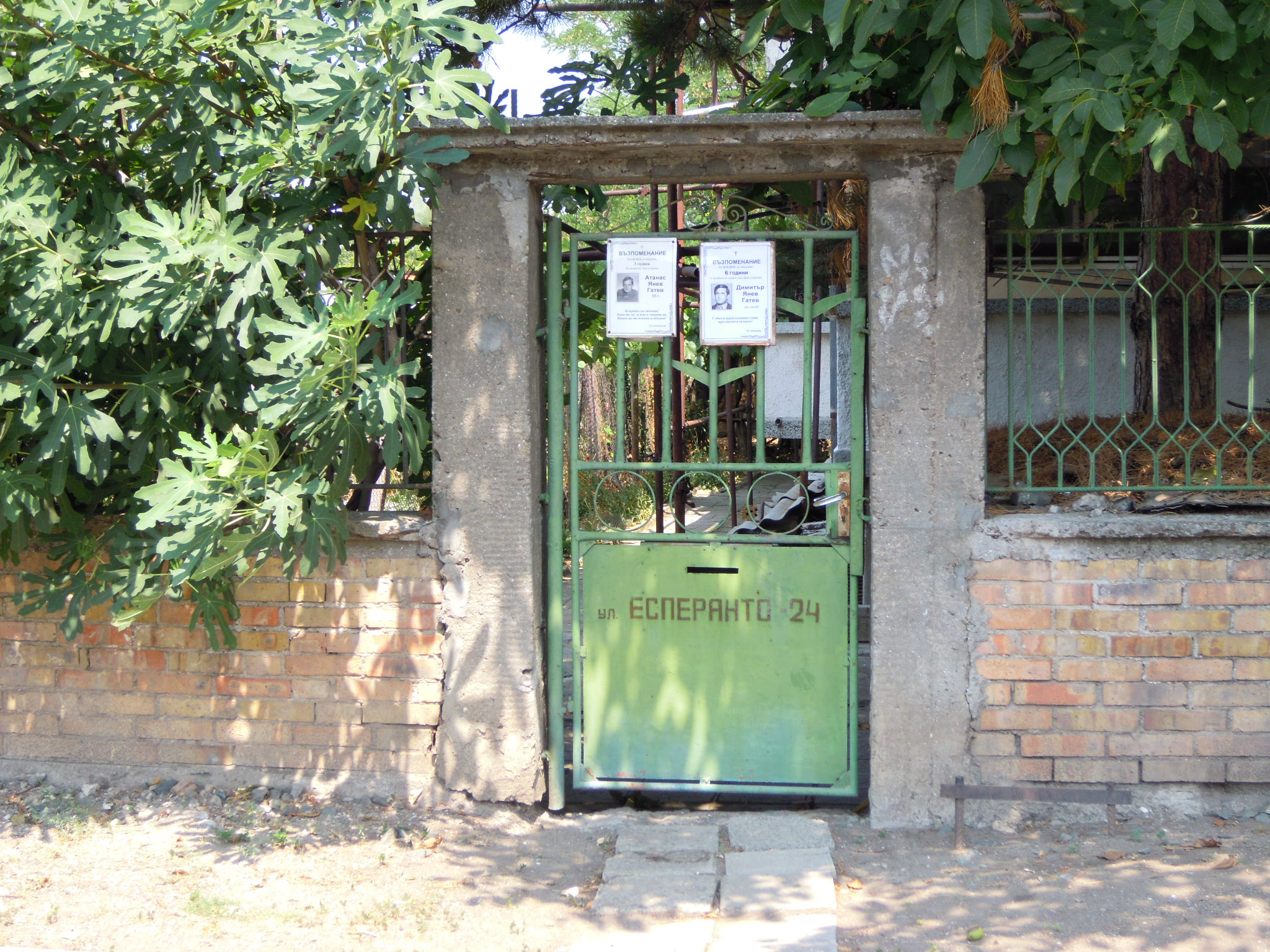 Domo en la strato Esperanto en Burgas (distrikto Dolno Ezerovo). Plejparto de la domoj en tiu strato ne havas stratŝildon aŭ alimaniere indikitan stratnomon.